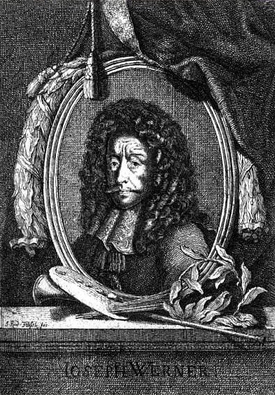 Portrait des Schweizer Malers Joseph Werner.